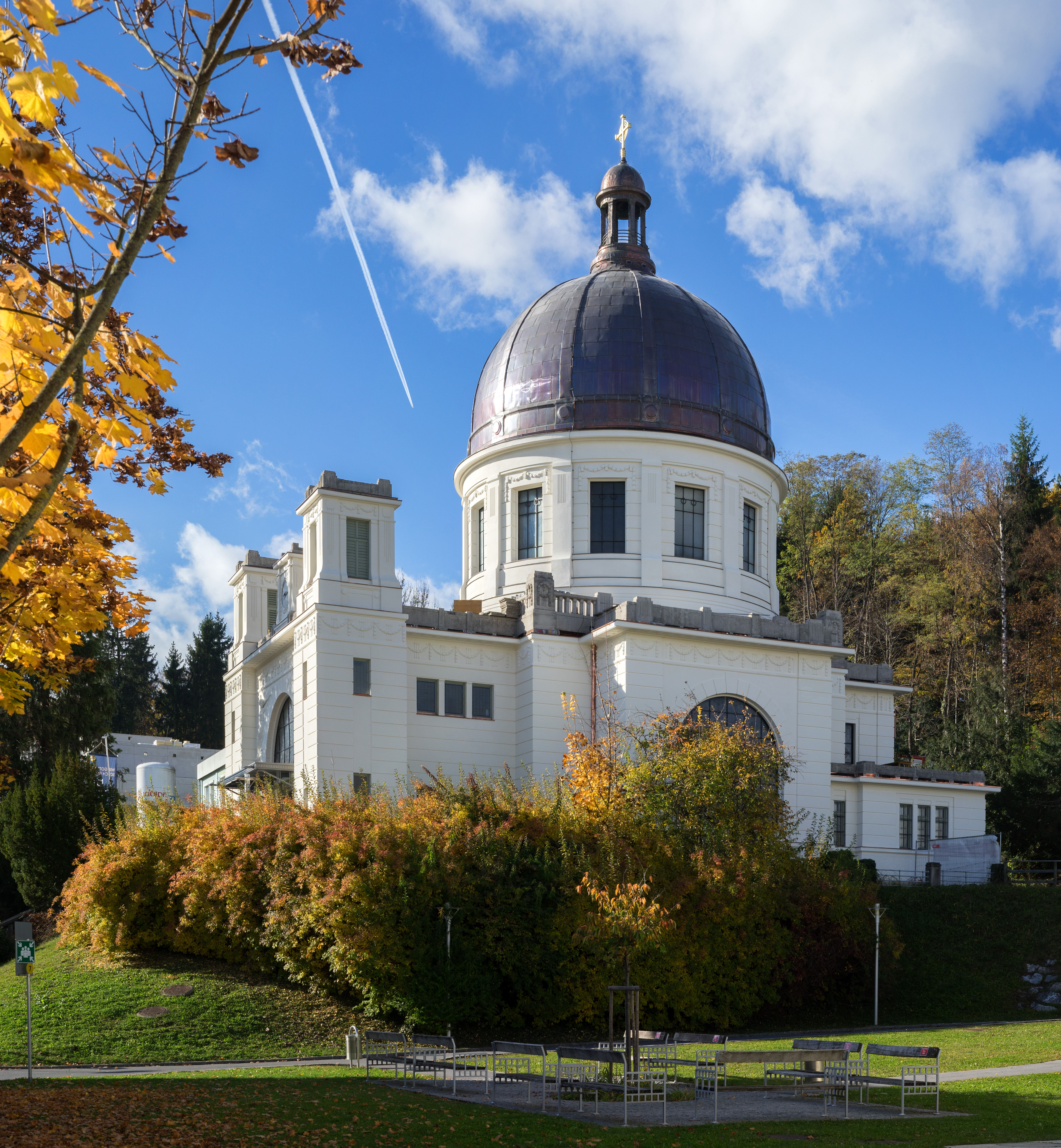 Krankenhauskirche, Graz 1